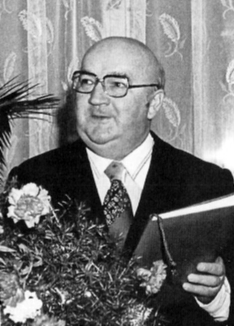 Wilhelm Szewczyk. Fotografia ze zbiorów prywatnych Romana Cop.